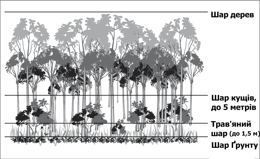 Beschreibung / Description Vegetationsgliederung im Wald auf ukrainisch